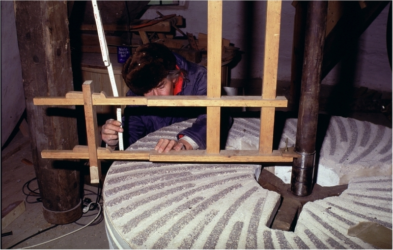 Der untere Mühlstein (Bodenstein) wird mit Hilfe des Steinzirkels genau ausgerichtet